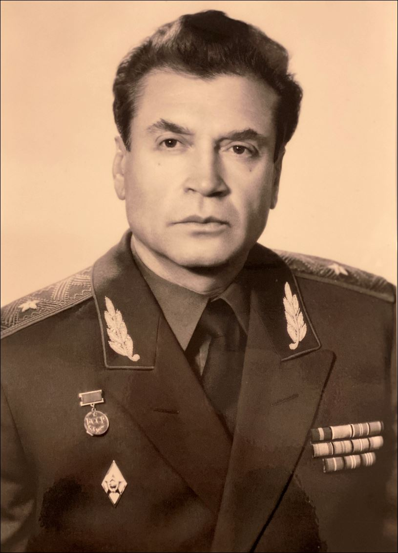 С 1984 г. по 1994 г. осуществил модернизацию медицинской службы Войск ПВО (СССР) России. Его организаторские способности и расширение объёма медицинской помощи военнослужащим и населению военных городков от Калининграда до Камчатки спасли тысячи жизней.